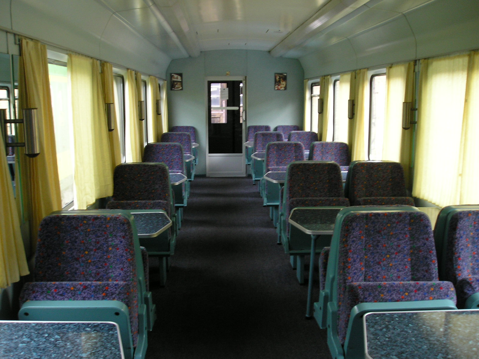 MÁV 8871 restaurant